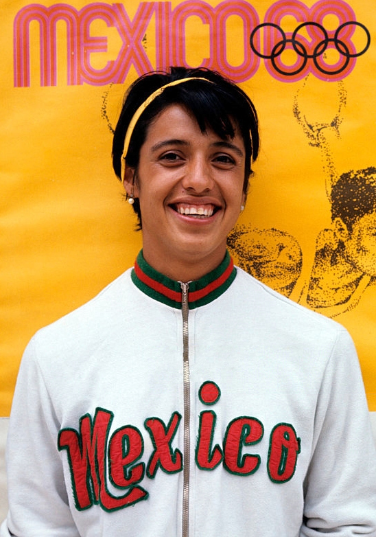 Enriqueta Basilio, 1968 Olympics